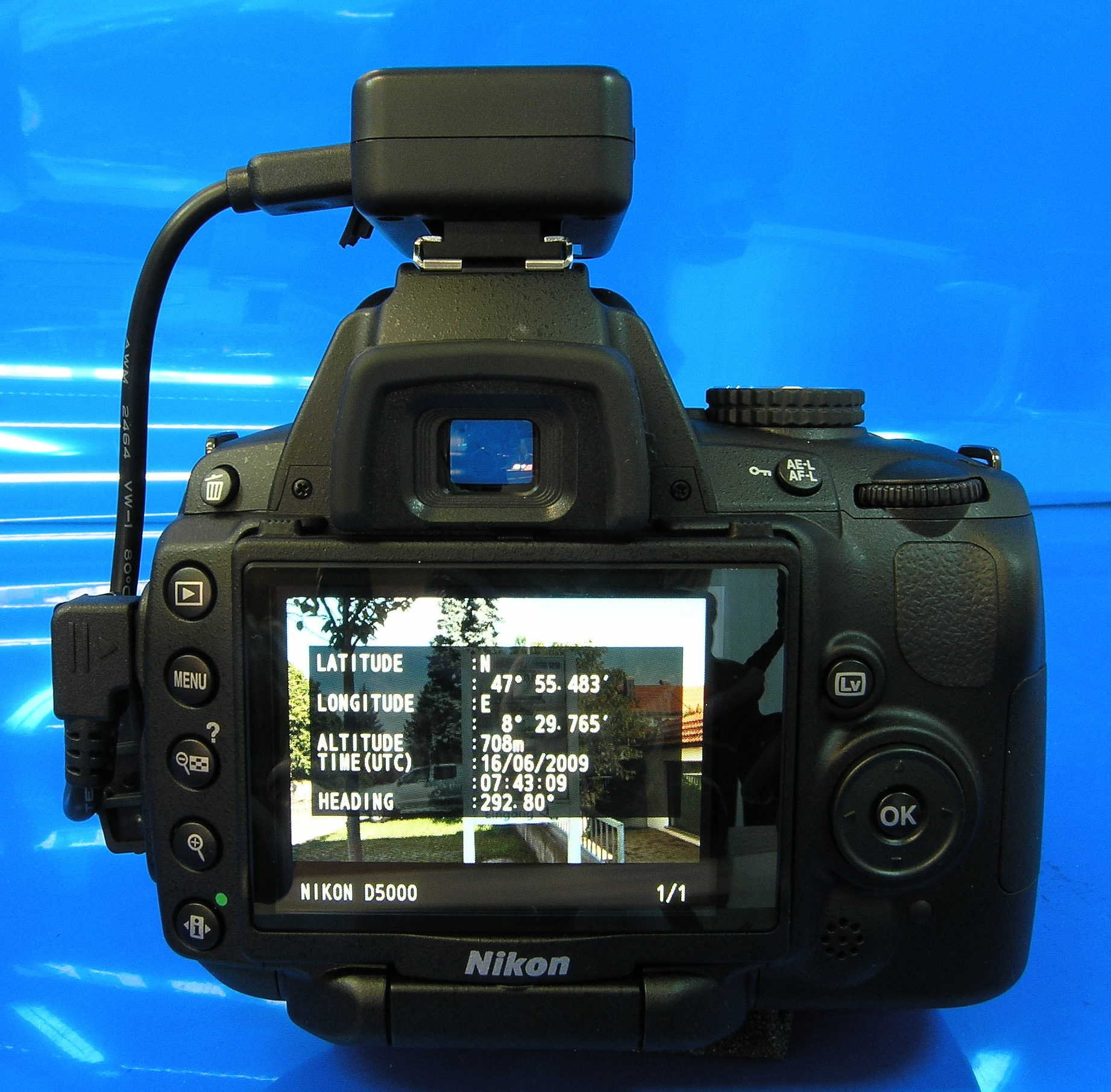 Solmeta Geotagger N2 Kompass, Foto-GPS für diverse GPS-fähige Nikon DSLR. Die Geo-Informationen werden direkt bei Aufnahme in die Bilddatei gespeichert.